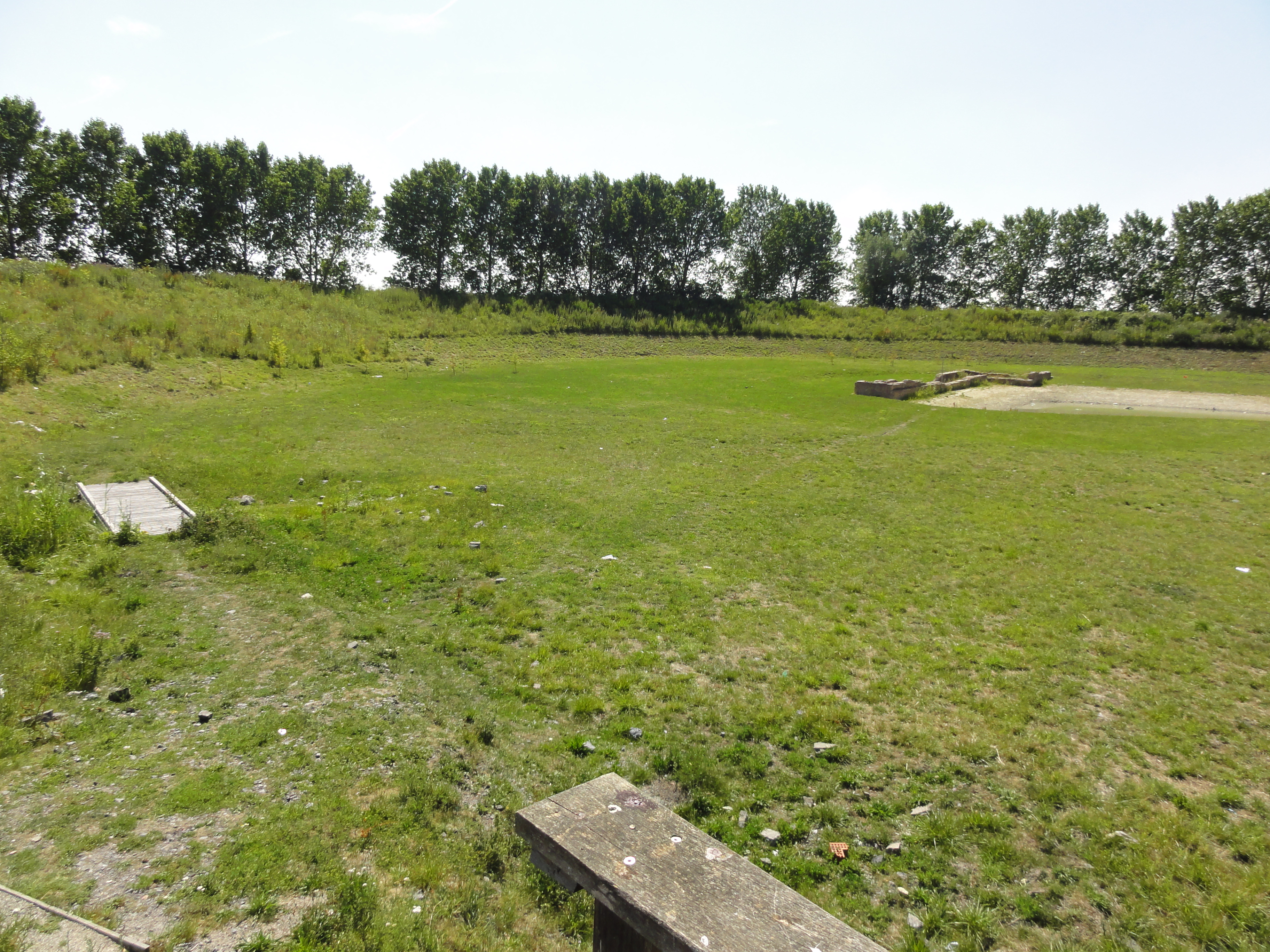 Terril n° 159 dit Fosse d'Hérin, Fosse Hérin de la Compagnie des mines d'Anzin, Hérin, Nord, Nord-Pas-de-Calais, France.